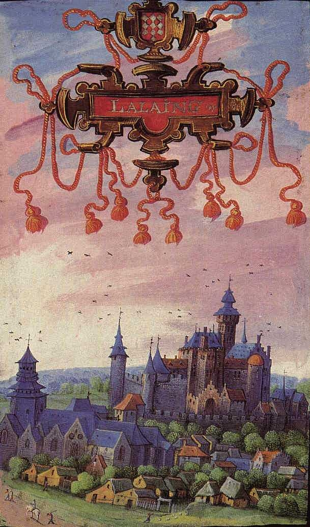 Cartulaire le Lallaing Nord france duc de Croy